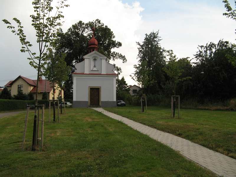 Kostel Nejsvětější Trojice s alejí, náves, Oucmanice.